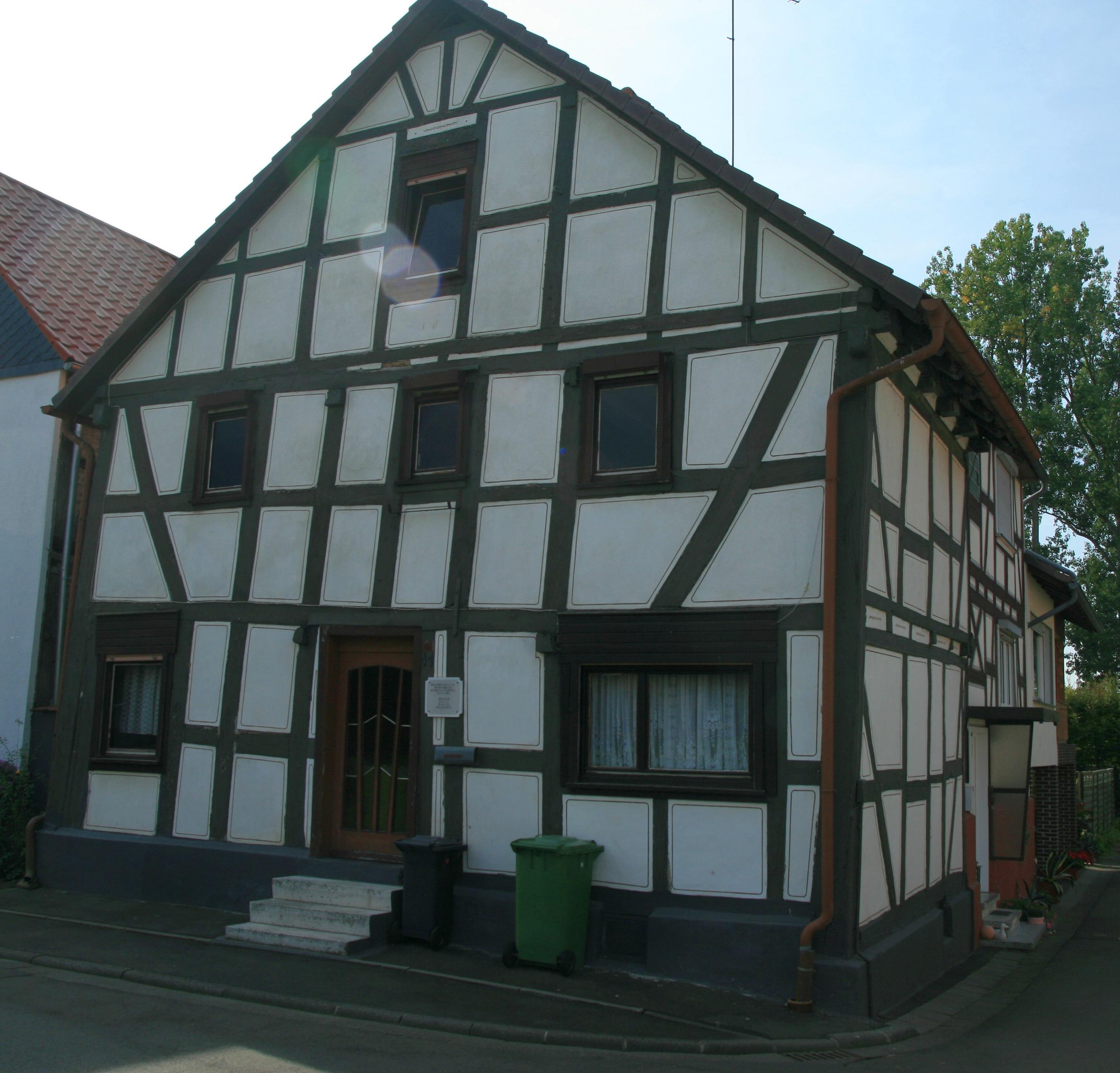 Amöneburg, Rüdigheim Dorfstraße Dieses Foto entstand im Rahmen des Projekts Wiki Loves Monuments Mittelhessen, das aus dem Community-Projektbudget von Wikimedia Deutschland e. V. gefördert wurde.